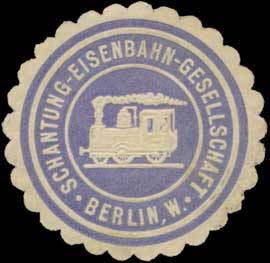 Siegelmarke Schantung-Eisenbahn-Gesellschaft Berlin